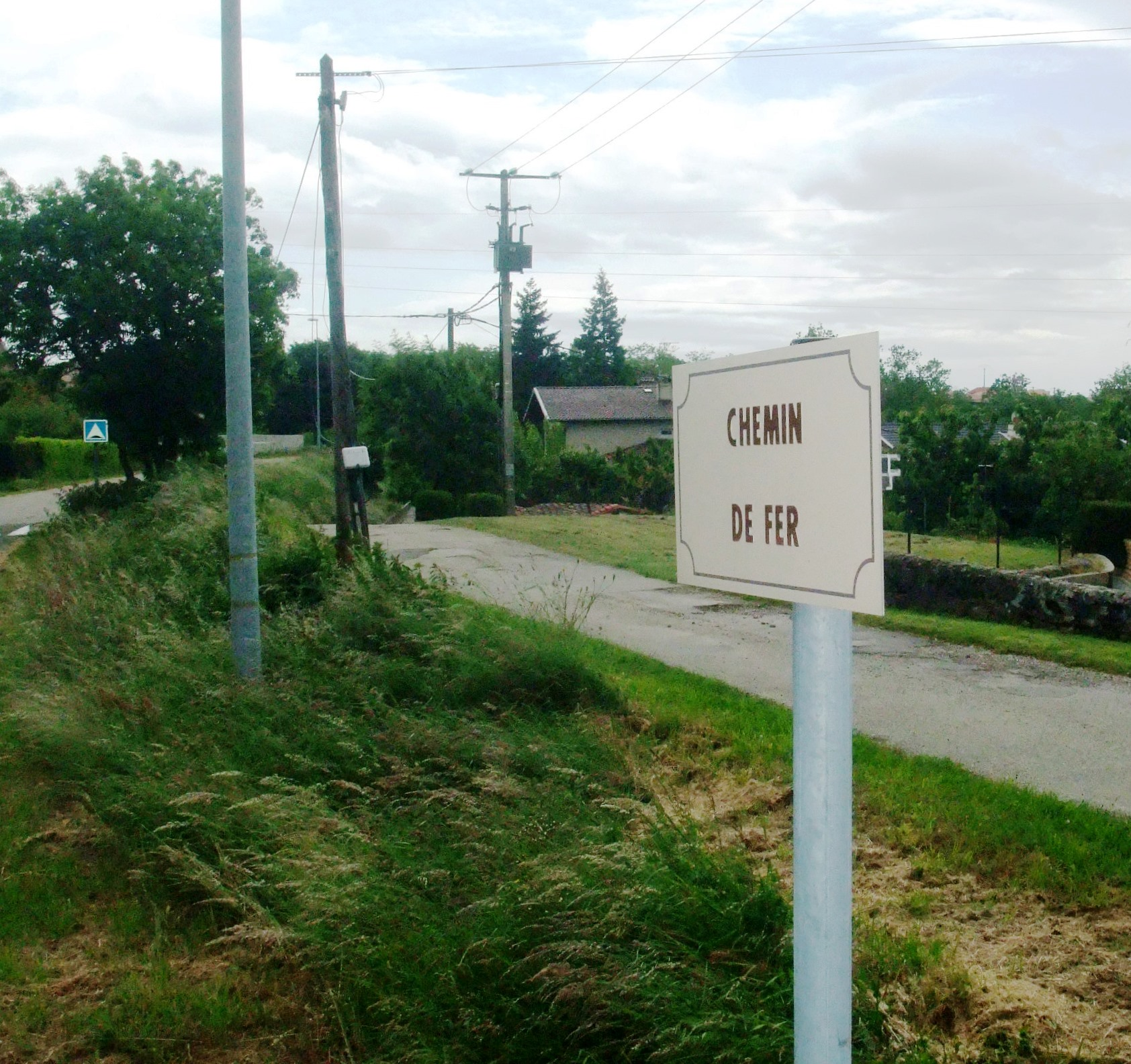 Boulieu chemin de fer